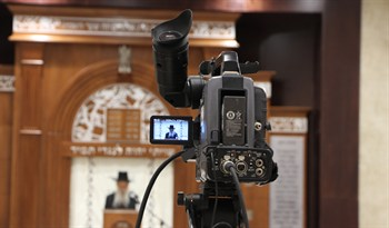 צילום שיעור עבור אתר ישיבה, בישיבת בית אל